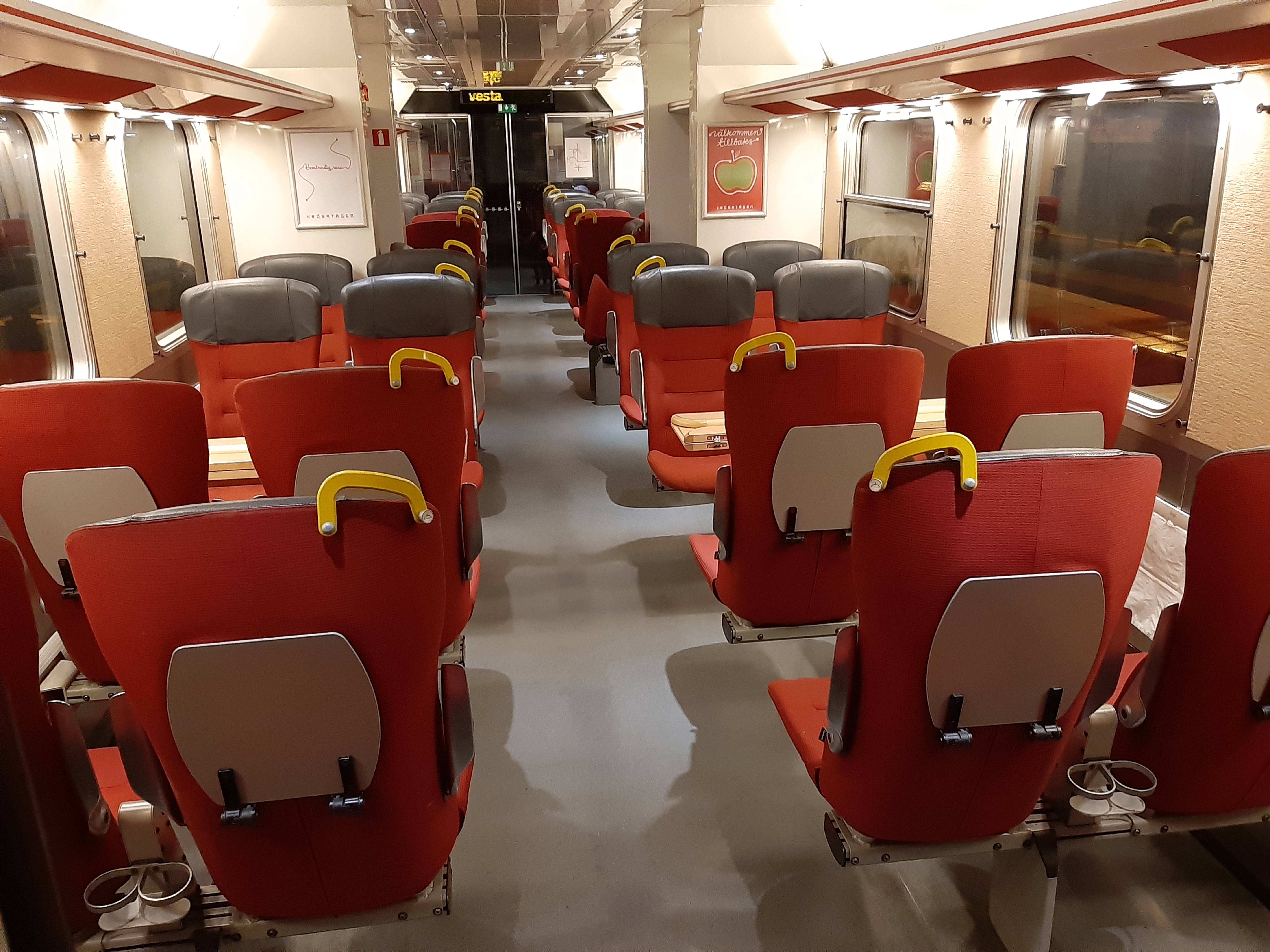 Interiör X11 Krösatåg Växjö-Hässleholm stora salongen